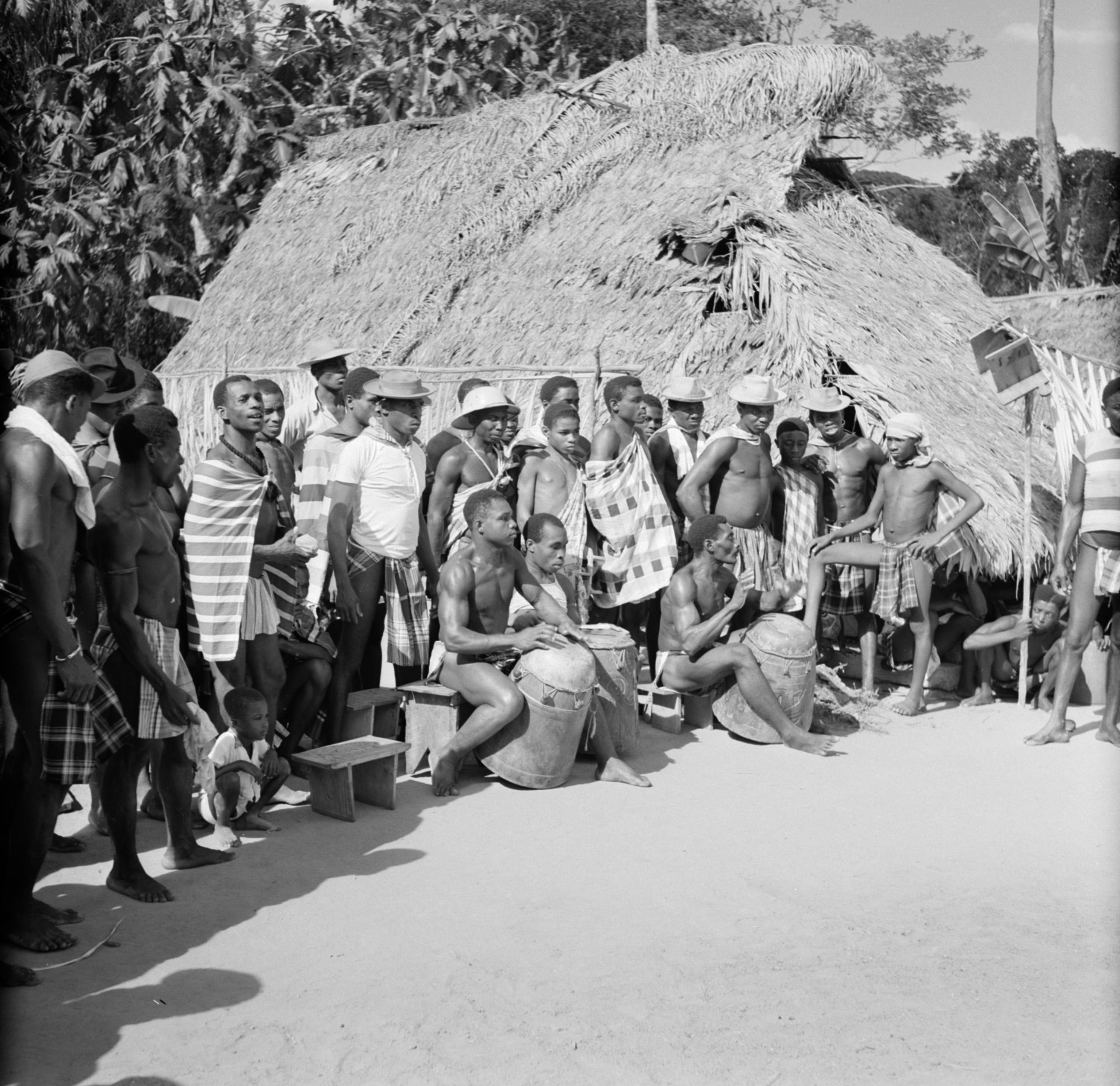 Collectie / Archief : Fotocollectie Van de Poll Reportage / Serie : Nederlandse Antillen en Suriname ten tijde van het koninklijk bezoek van koningin Juliana en prins Bernhard in 1955 Beschrijving : Trommelaars in het boslandcreooldorp Moengotapoe Datum : 31 oktober 1955 Locatie : Moengotapoe, Suriname Trefwoorden : bosneger, inheemsen, muziek Persoonsnaam : moengo tappoe Fotograaf : Poll, Willem van de Auteursrechthebbende : Nationaal Archief Materiaalsoort : Negatief (zwart/wit) Nummer archiefinventaris : bekijk toegang 2.24.14.02 Bestanddeelnummer : 252-4544